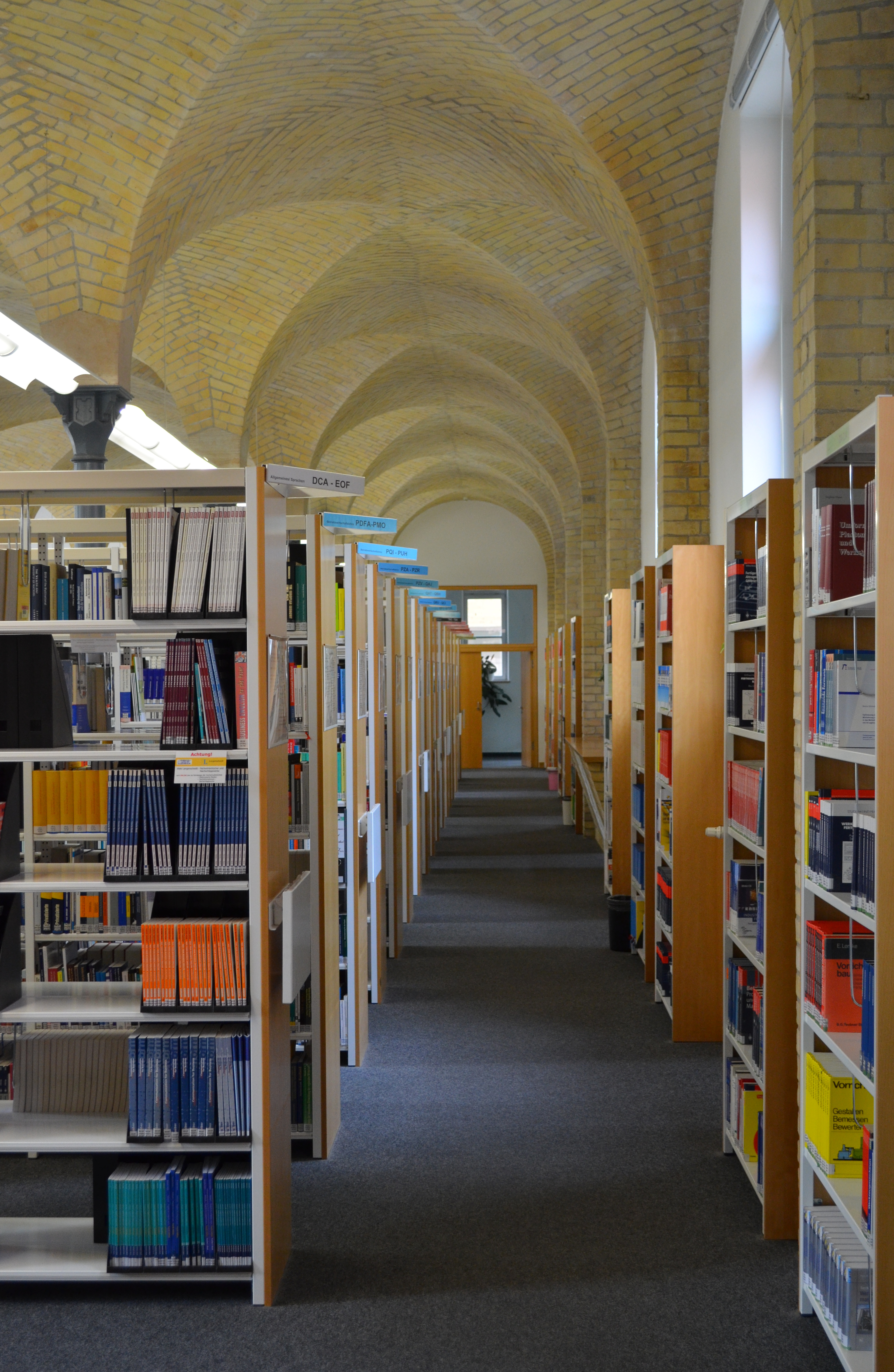 Fachhochschule Brandenburg, Freihandbereich der Hochschulbibliothek